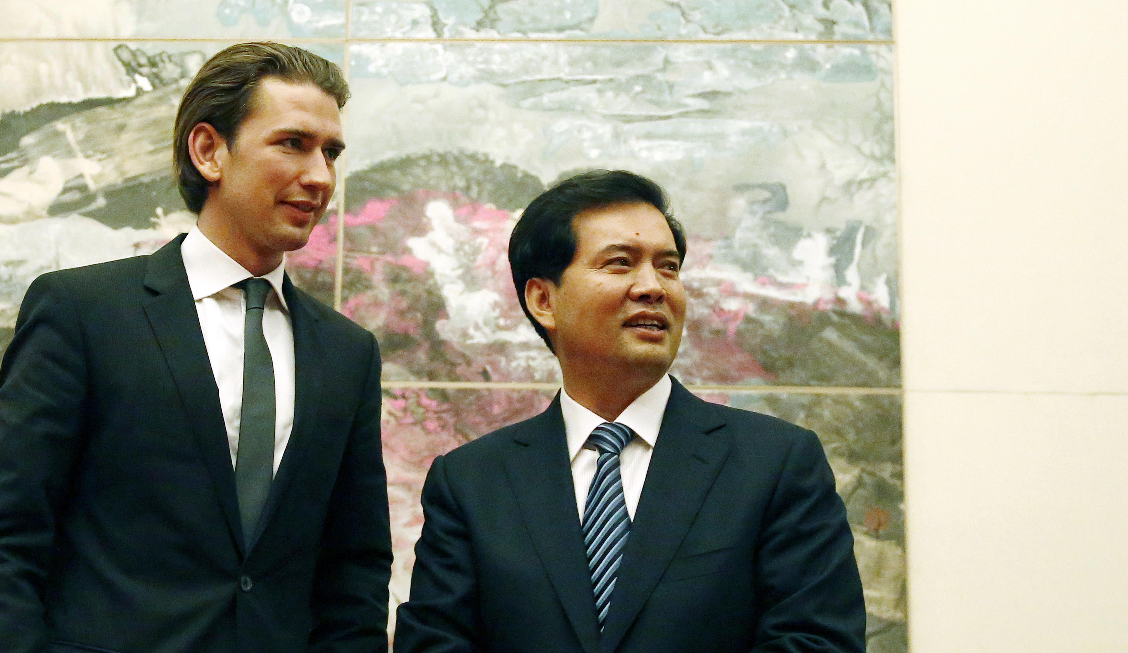 Arbeitsbesuch China. Bundesminister Sebastian Kurz trifft Minister Wang Zhengwei, Direktor der Nationalen Kommission für Ethnische Angelegenheiten, in Peking. 19.10.2014, Foto: Dragan Tatic